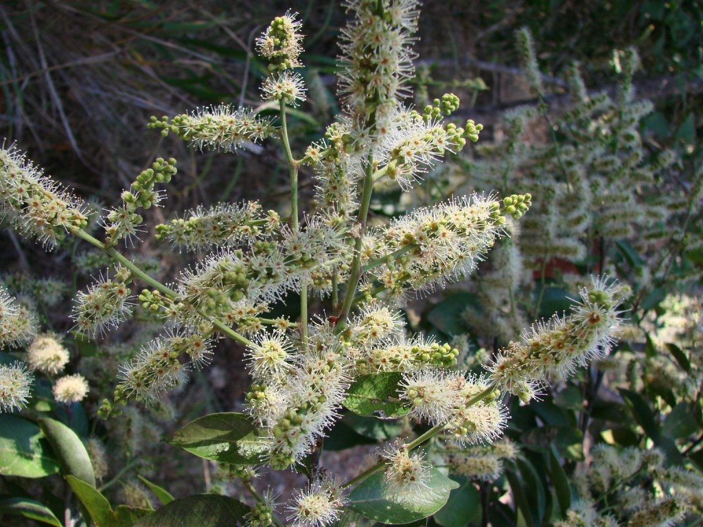 Licania humilis - CHRYSOBALANACEAE Jardim Botânico de Brasília - Brasília - Distrito Federal - Brasil.